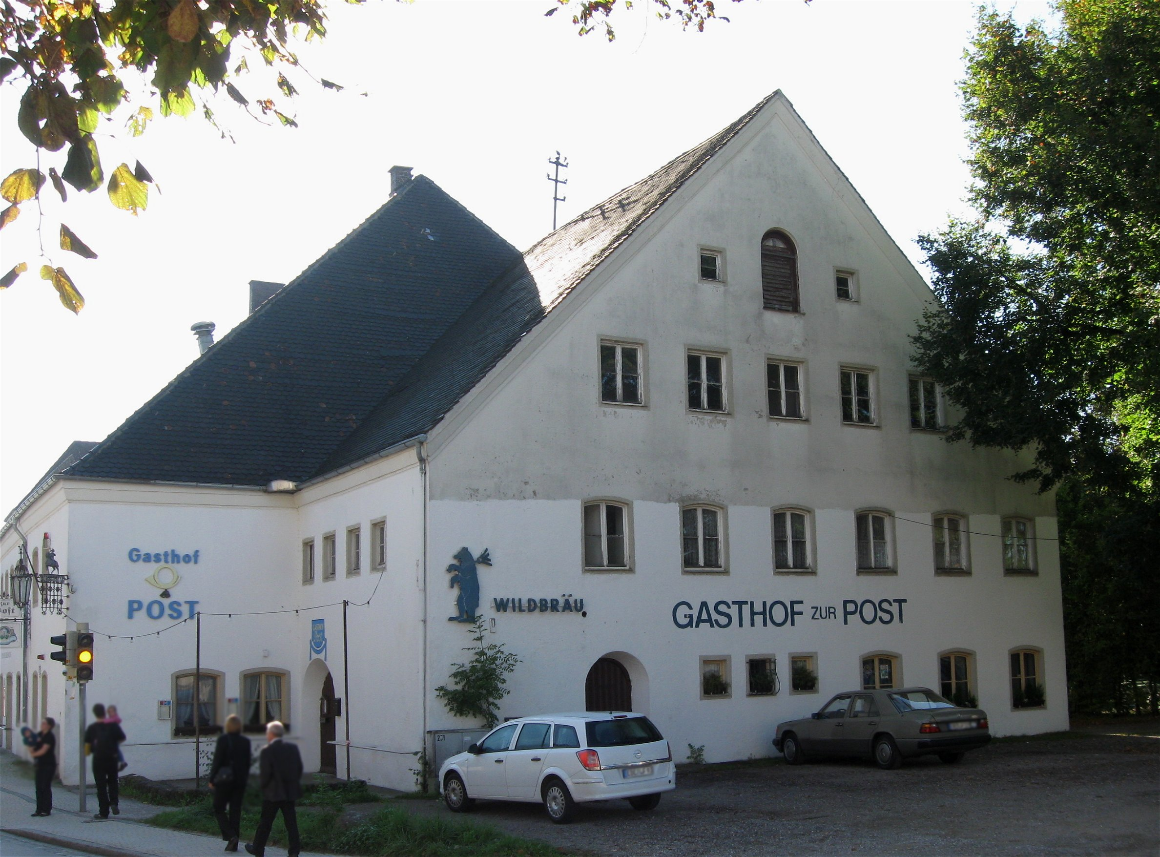 Münchener Straße 25. Ehem. Taverne, jetzt Gasthof Post, zweigeschossiger Walmdachbau mit Traufgesims und angesetztem Satteldachbau, 1. Hälfte 19. Jh., Walmdach nach 1855.